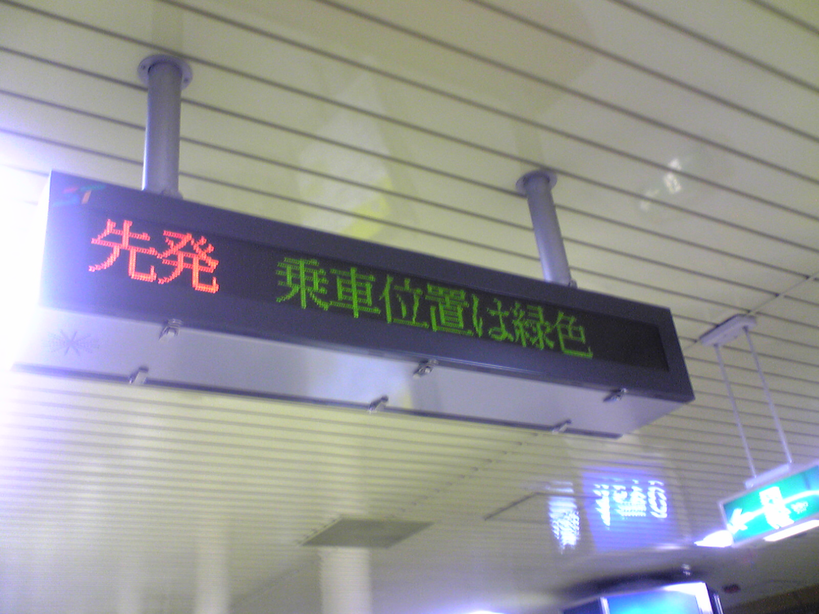 札幌市営地下鉄 南北線麻生駅ホーム案内装置